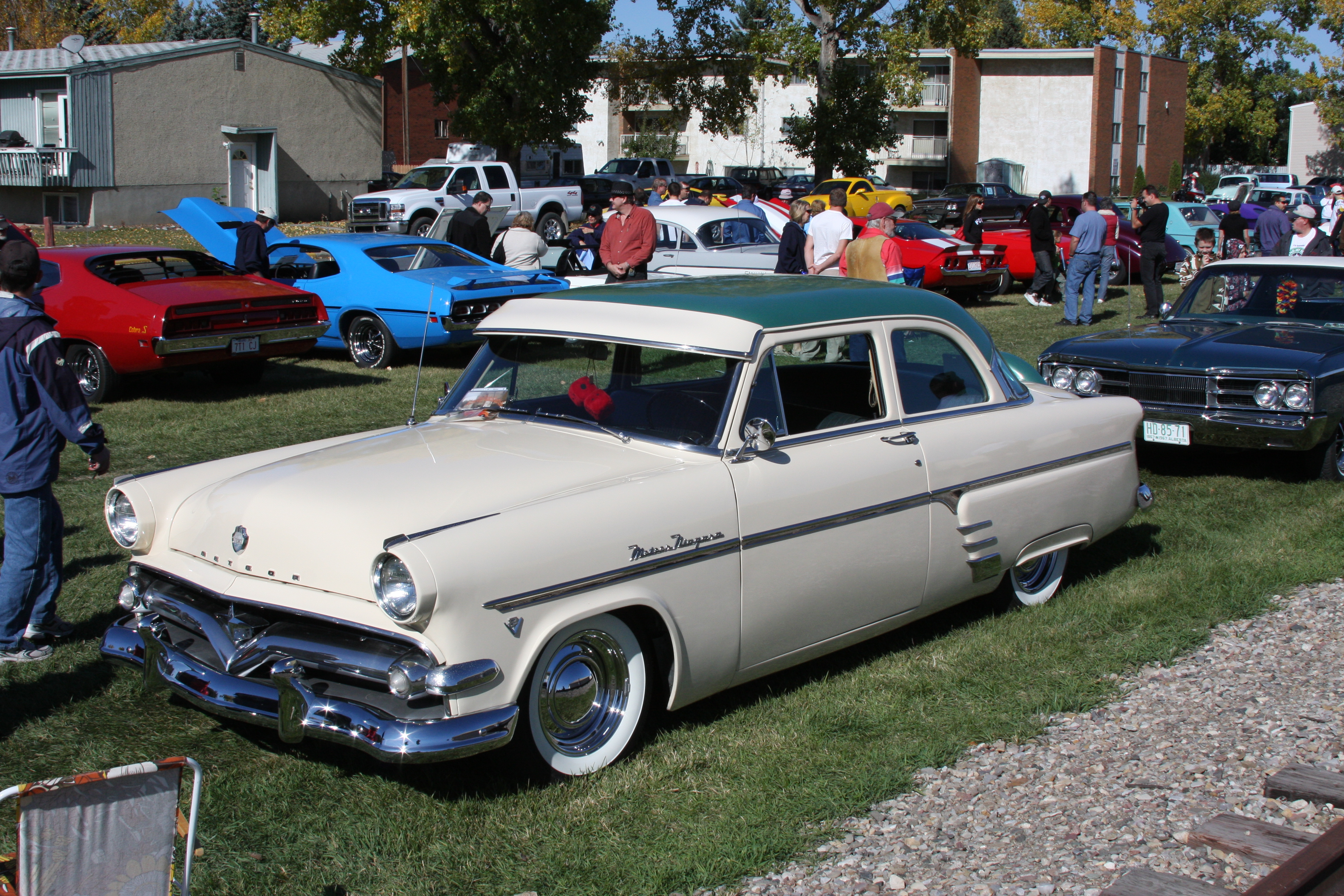 1954 Meteor Niagara - Canadian car.